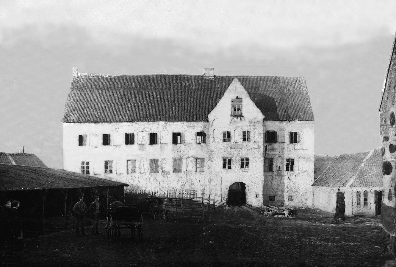 Bjerjöholms slotts södra huvudlänga före rivningen 1889.